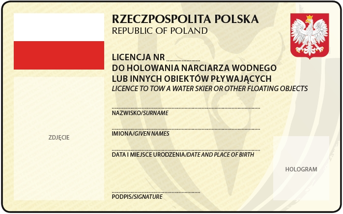 Wzór licencji do holowania narciarza wodnego z 2013 roku. Awers.